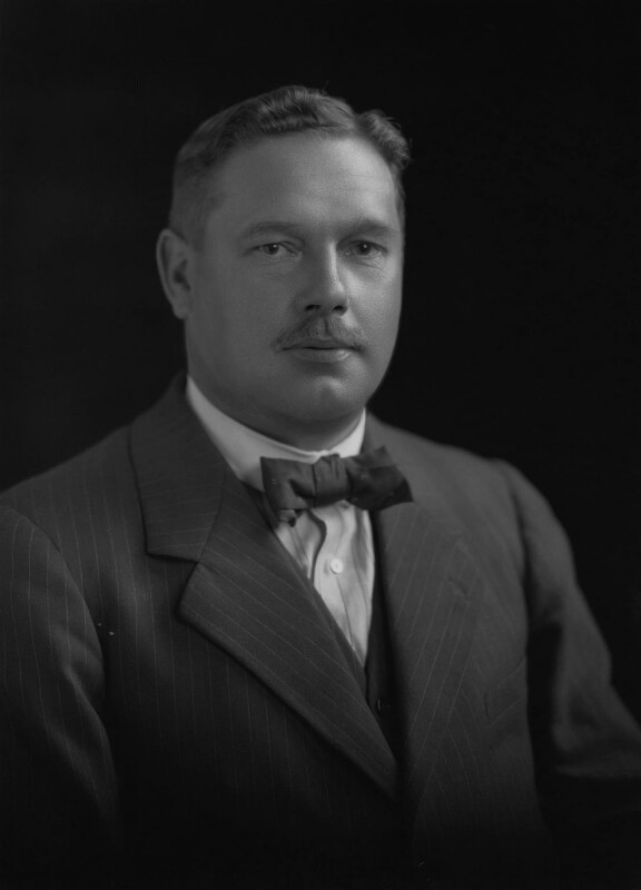 George Hicks